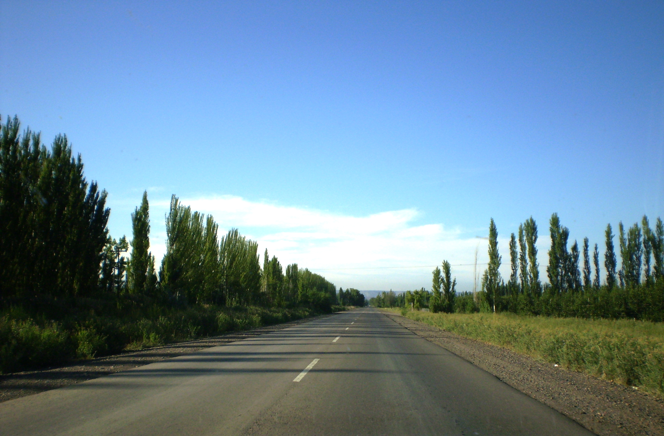 Ruta General Roca a Paso Cordova, con fincas de frutales a sus márgenes. Provincia de Río Negro, Argentina. (Alto Valle)